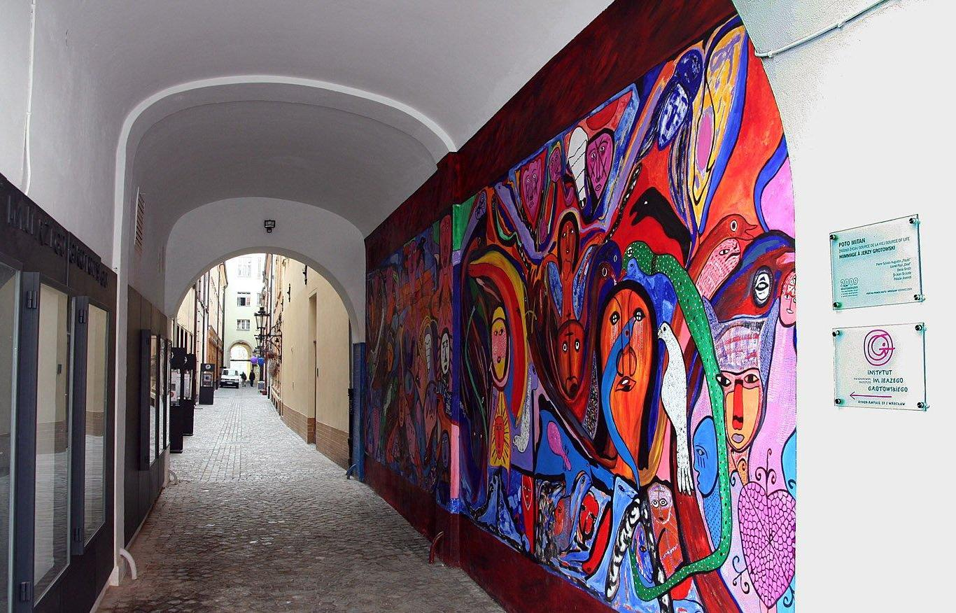 Wejście do Przejścia Żelaźniczego od wschodniej strony rynku. Po prawej malowidło poświęcone Jerzemu Grotowskiemu, którego imienia Instytut mieści się w głębi